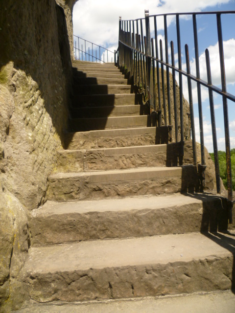 Eine in die Externsteine eingemeißelte Treppe um den Aufstieg zu erleichtern.